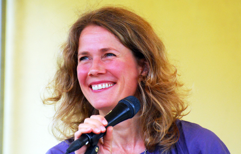 Irma Schultz Keller uppträder vid en lunchkonsert i Kungsträdgården 21 juli 2015.